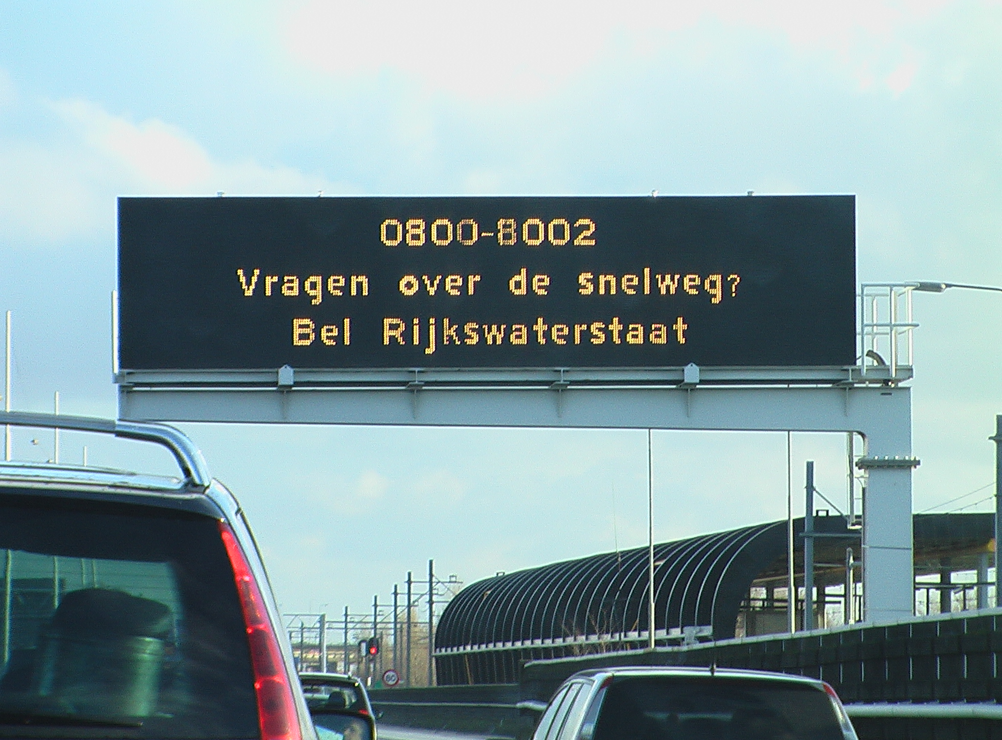 De A12 nabij Den Haag in 2006.